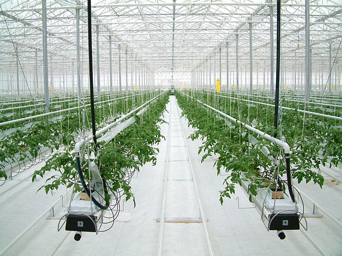 Система капельного полива в современной гидропонной теплице